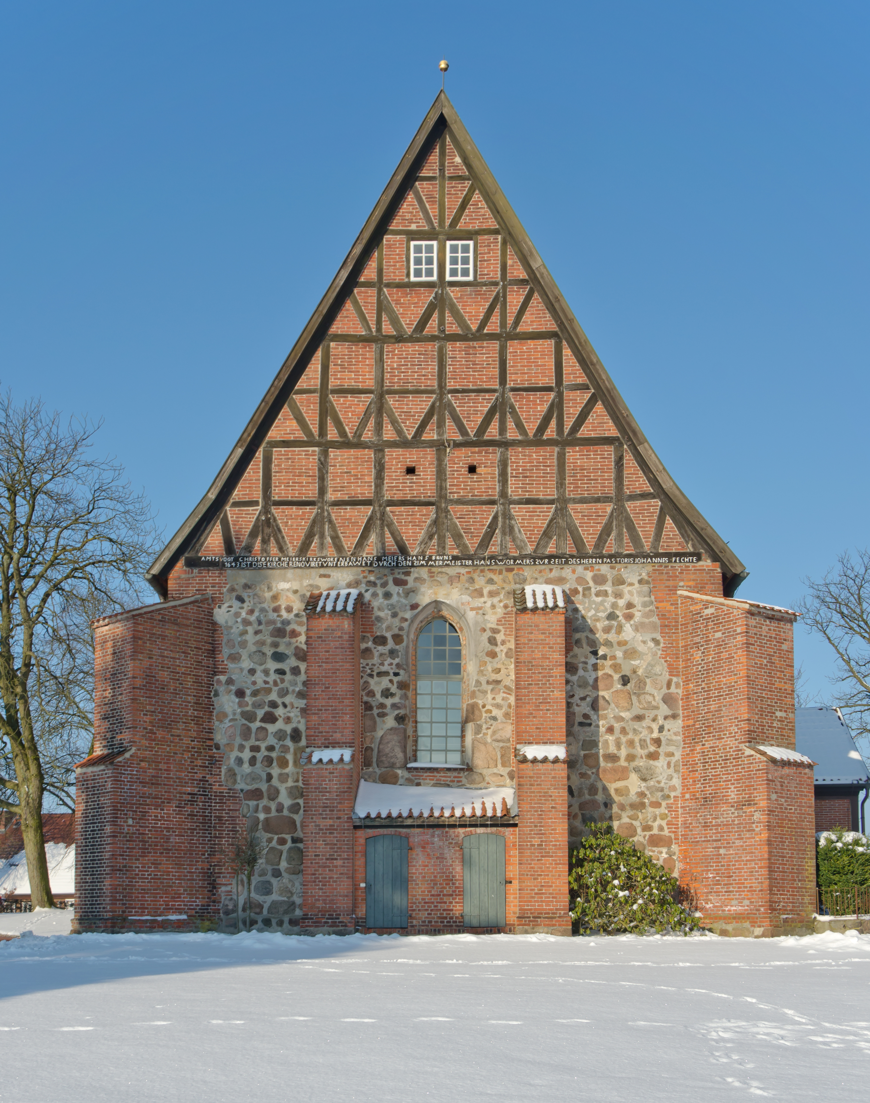 Salzhausen St Johannis Giebel